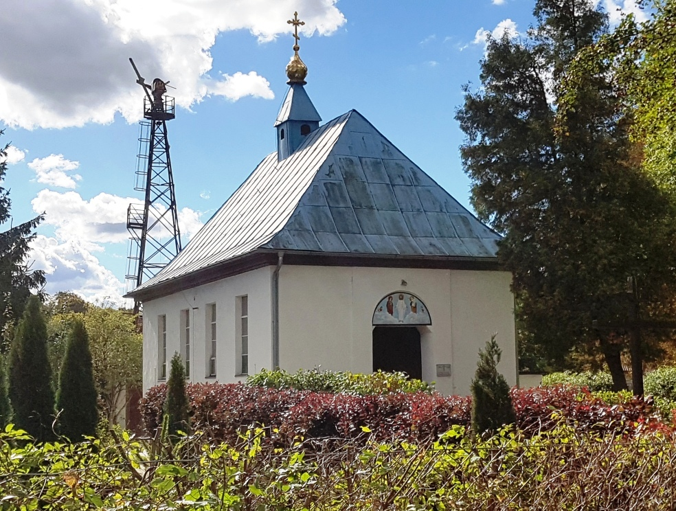 Cerkiew Przemienienia Pańskiego w Braniewie